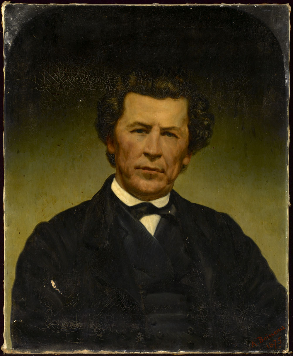 A portrait of Joseph Guibord, painted in 1875 by Alfred Boisseau